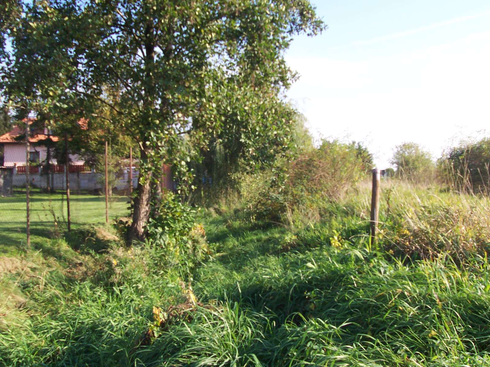 Nature reserve Hrnčířské louky Přírodní památka Hrnčířské louky